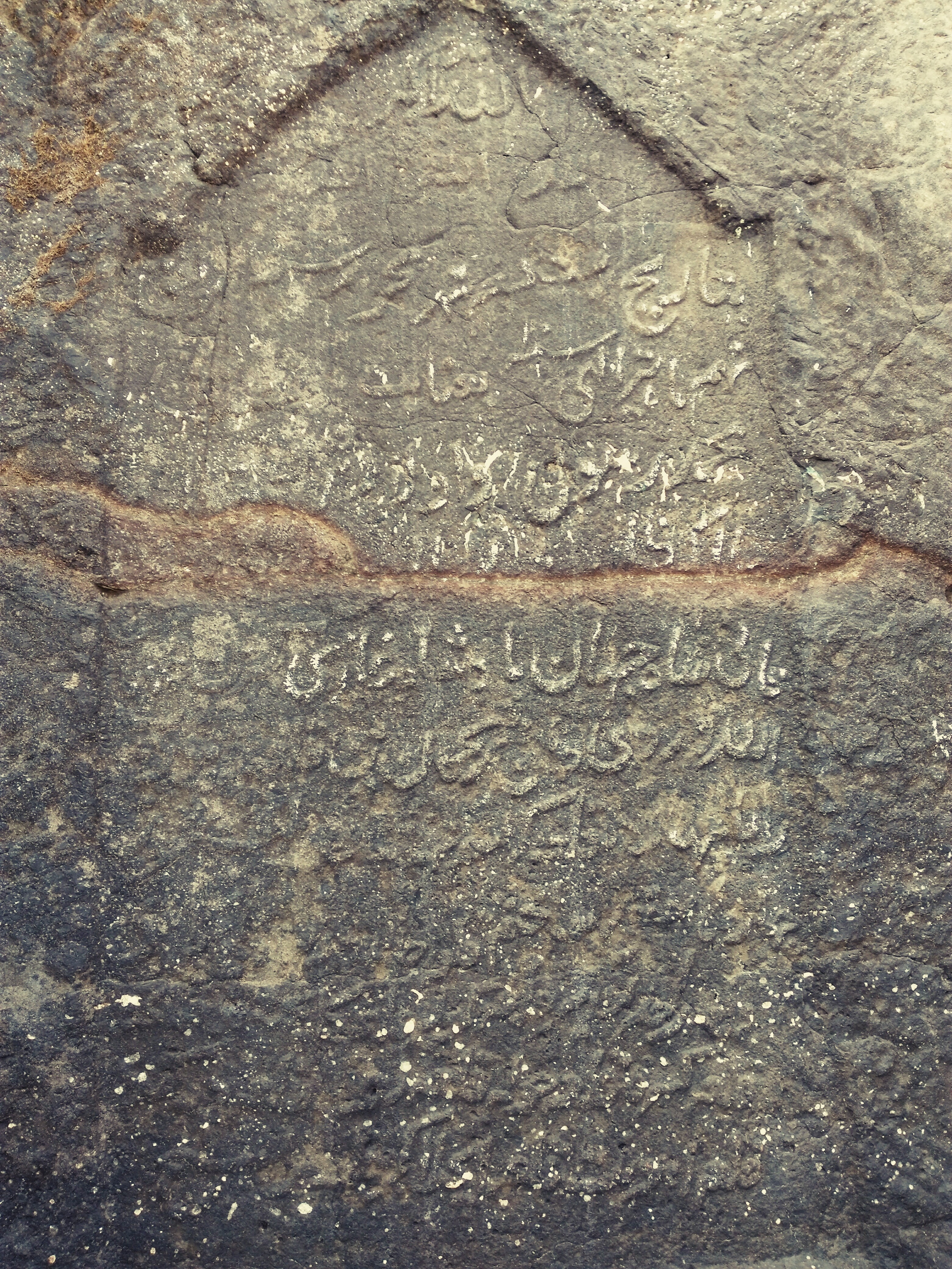 धोडप किल्ल्यावरील शिलालेख